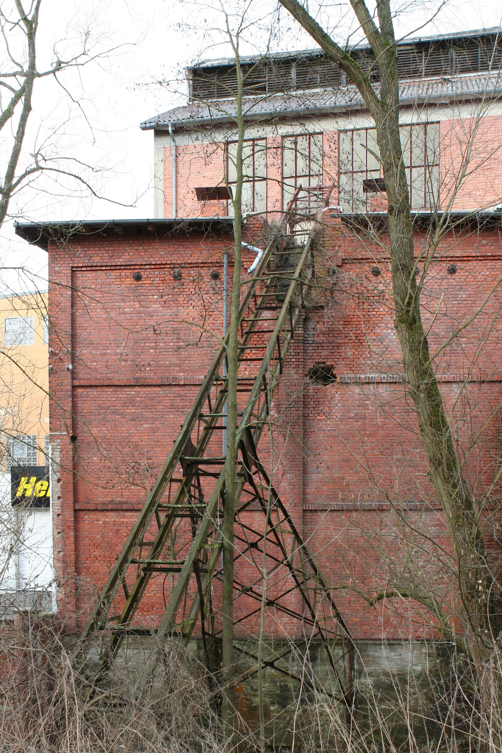 Brauerei Scheidmantel, Coburg-Cortendorf; ehem. Eisaufzug